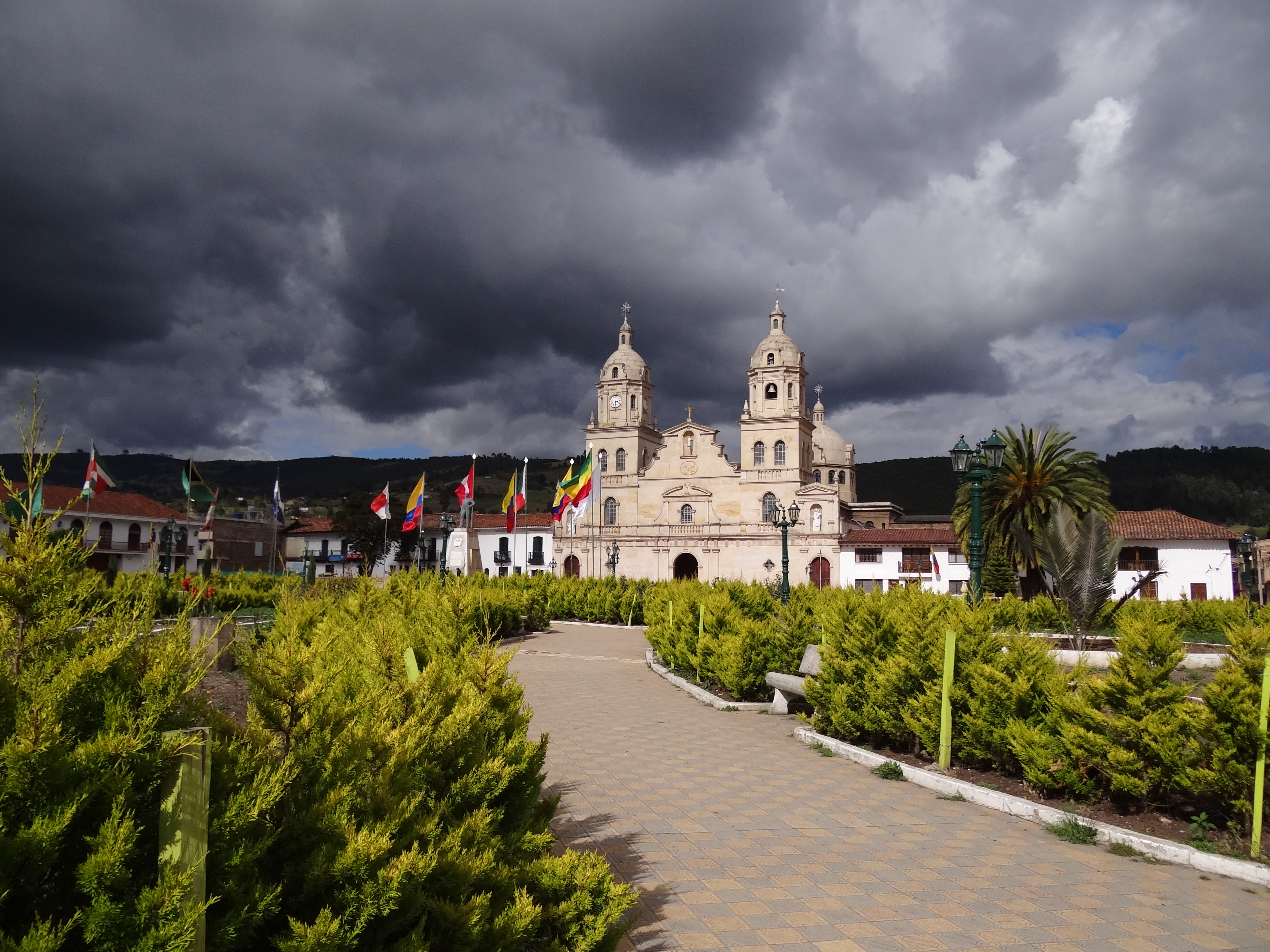 Parque del municipio de Santa Rosa de Viterbo, departamento de Boyacá, Colombia